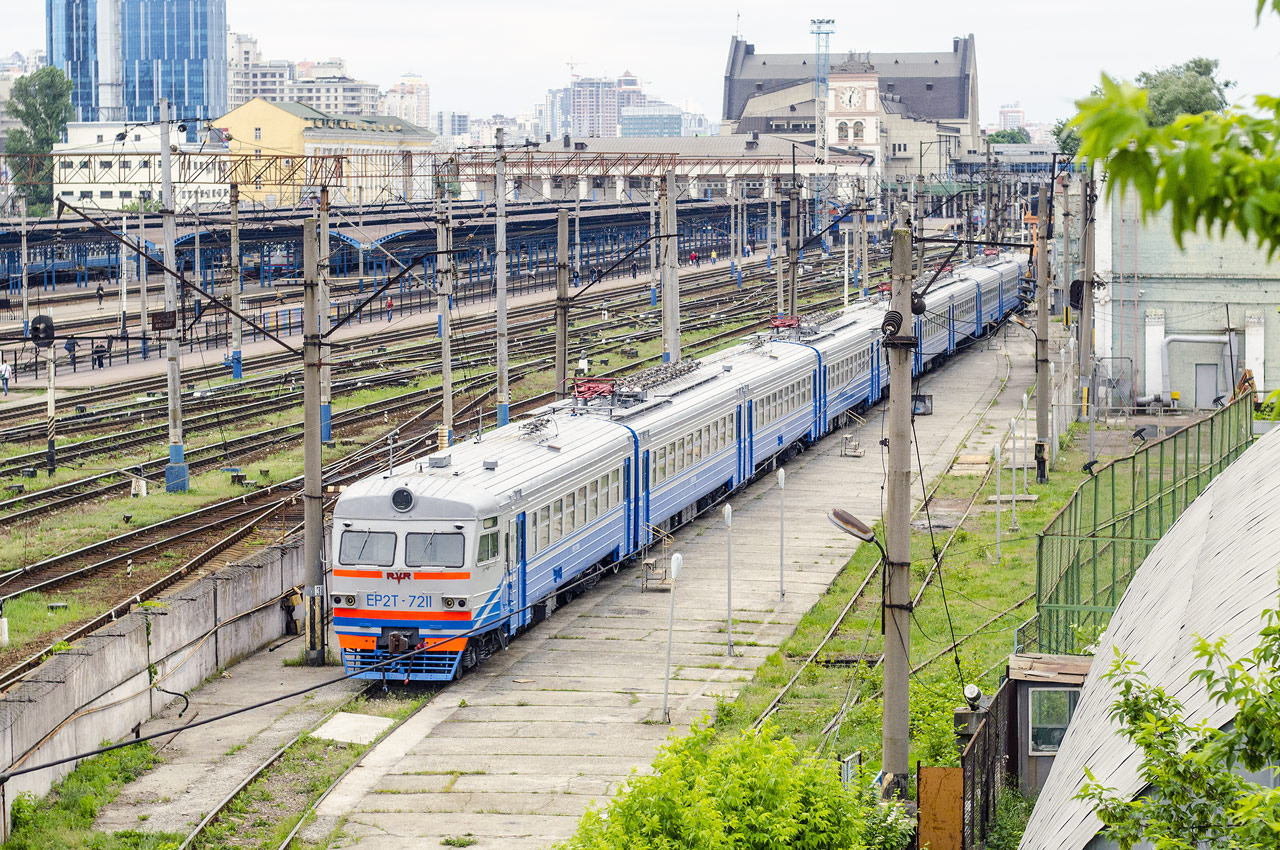 Электропоезд построен в десятивагонной составности. С завода поступил в депо Ясиноватая-Западная (Донецкой ж. д.). 04.2008 с переводом парка приписан к РПЧ-12 Ясиноватая. 26.02.2016 г. — передан в РПЧ-1 Харьков (Южной ж. д.). КР-2 Киевский ЭВРЗ 05.2015 г.